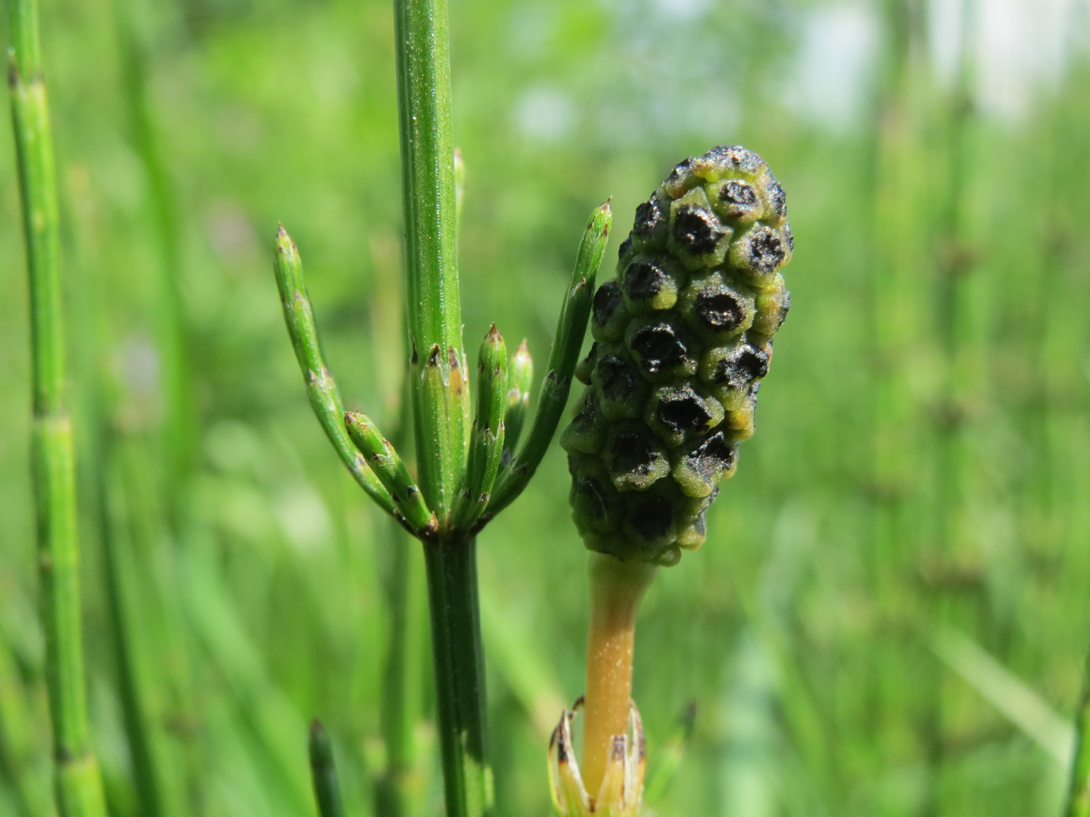 Sumpf-Schachtelhalm (Equisetum palustre) im Hockenheimer Rheinbogen